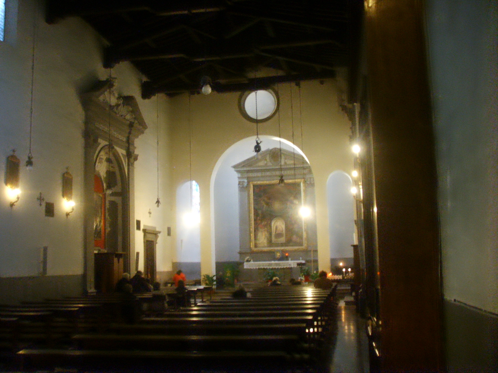 Prato Santa Maria del Soccorso